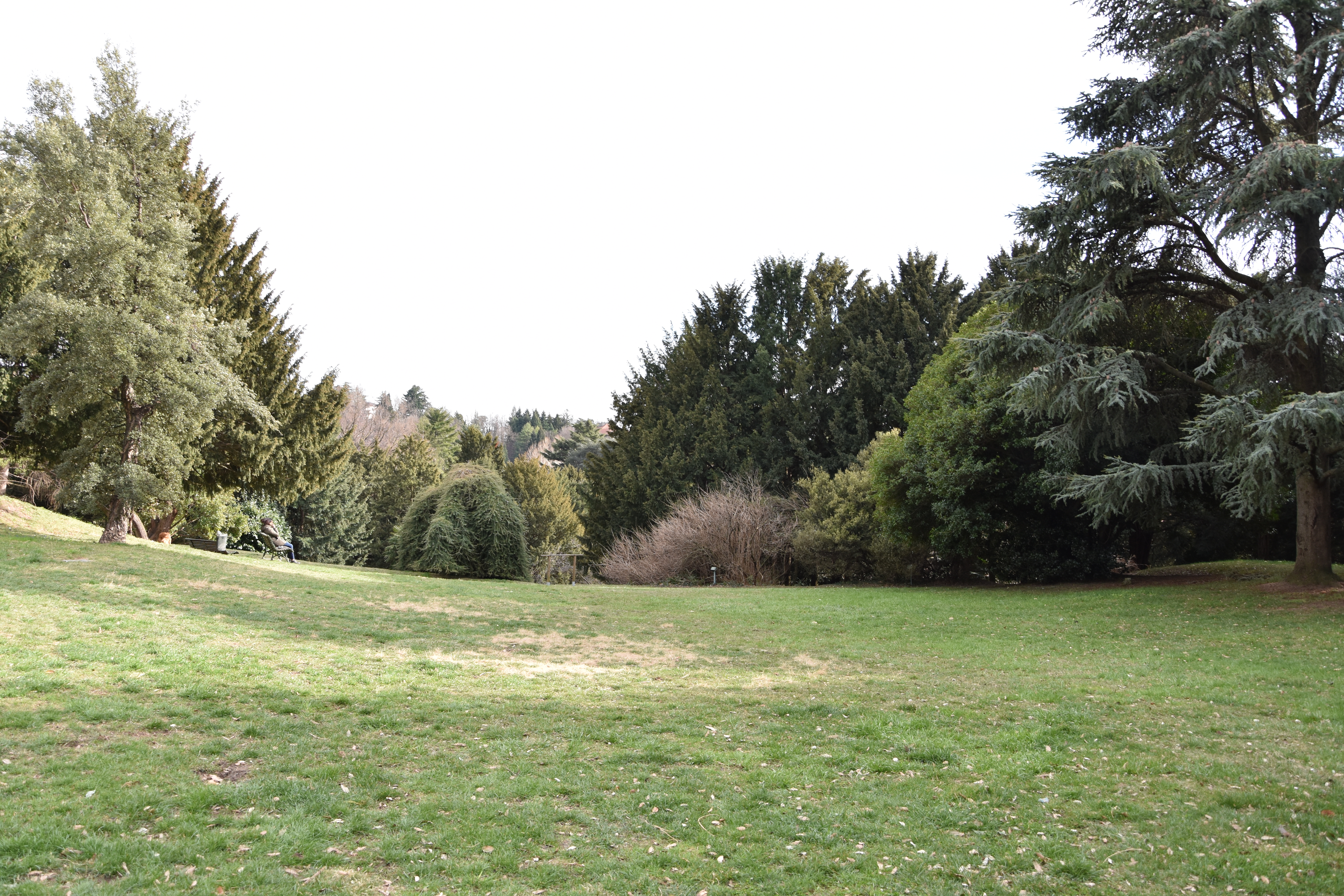 Parco del castello Mantegazza-Panza a Masnago.